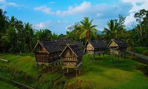 lumbung padi di gunakan sebagai tempat menyimpan padi